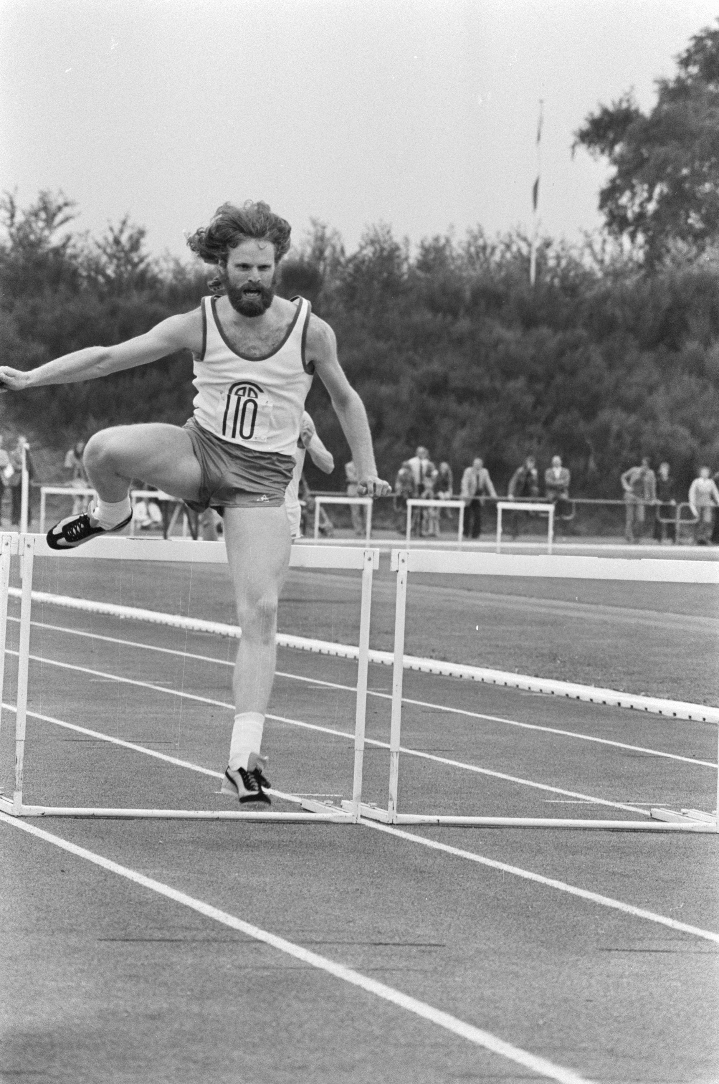 Collectie / Archief : Fotocollectie Anefo Reportage / Serie : [ onbekend ] Beschrijving : Nederlandse atletiekkampioenschappen 1974 op Papendal; Frank Nusse won de 400 meter horden Datum : 3 augustus 1974 Trefwoorden : atletiek, horden, kampioenschappen Persoonsnaam : Frank Nusse Instellingsnaam : Papendal Fotograaf : Verhoeff, Bert / Anefo Auteursrechthebbende : Nationaal Archief Materiaalsoort : Negatief (zwart/wit) Nummer archiefinventaris : bekijk toegang 2.24.01.05 Bestanddeelnummer : 927-3667